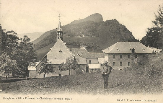 CPA Le Dauphiné, Couvent de Châlais-sur-Voreppe, un homme, Carte postale.